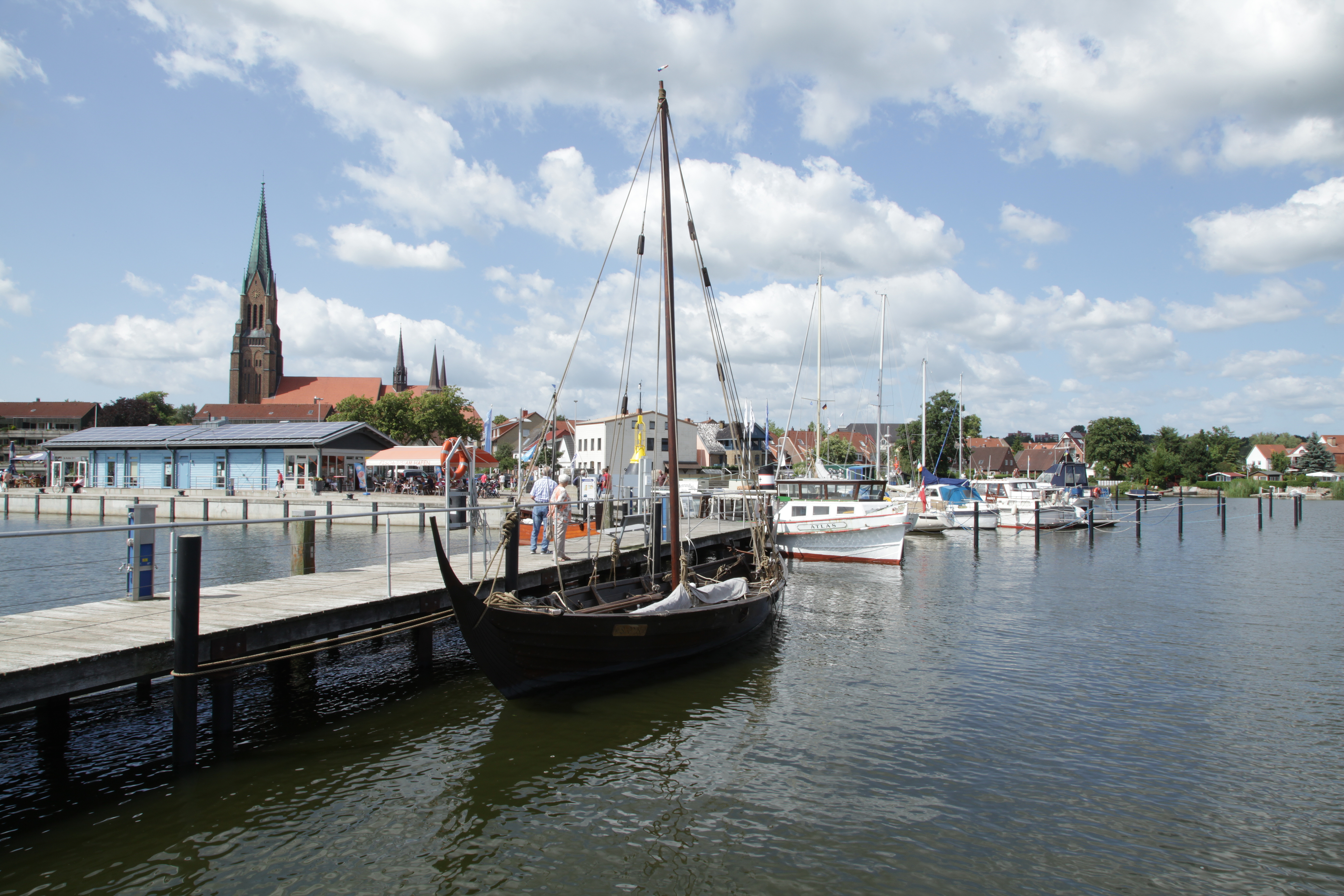 Die Sigyn an der Fahrgastbrücke, Am Hafen in Schleswig